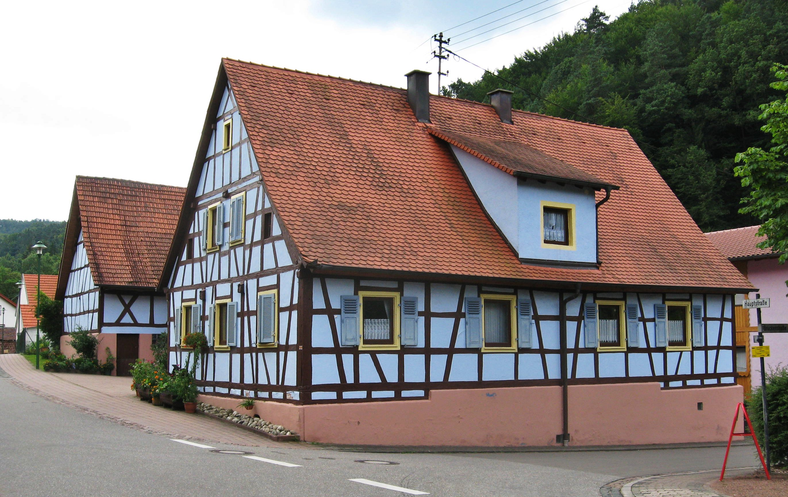 Fachwerkhaus an der Hauptstraße in Hirschthal (Pfalz)